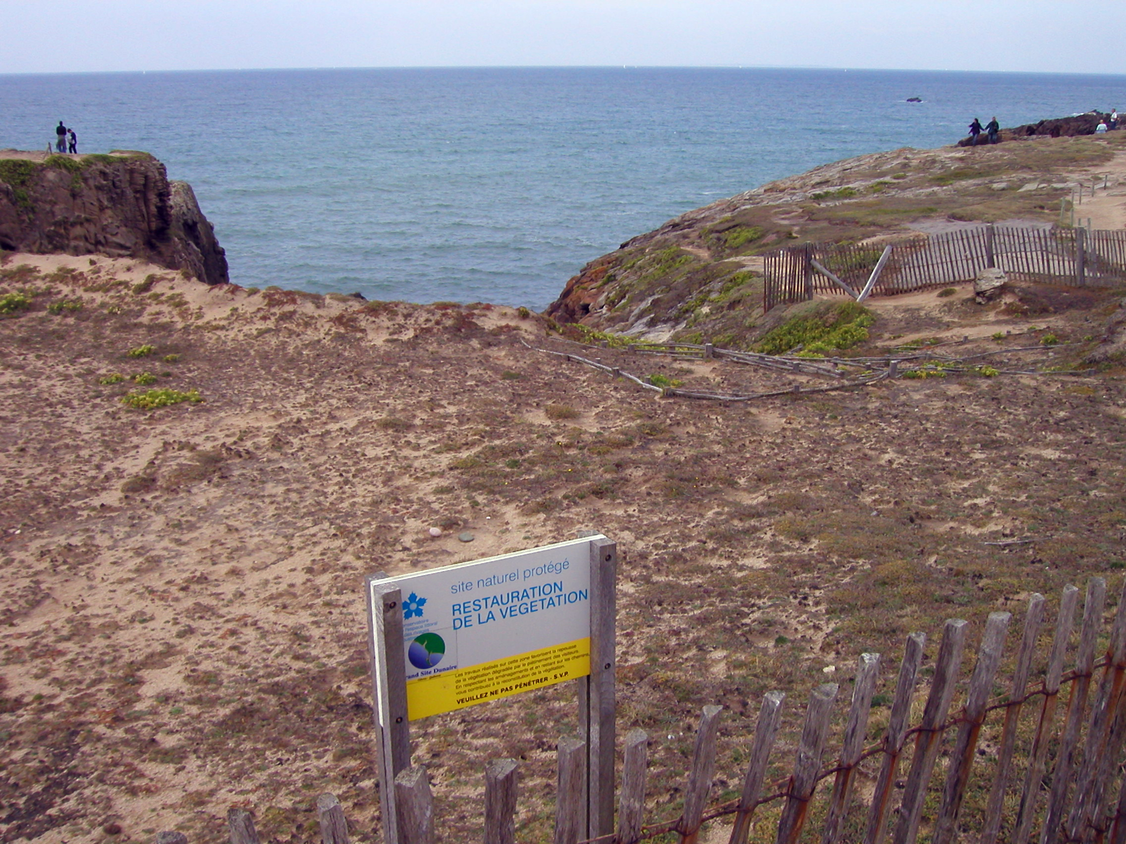 Versuch zur Restaurierung der Landschaft an der Côte Sauvage